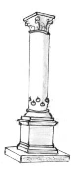 Je suis l'auteur de ce croquis.